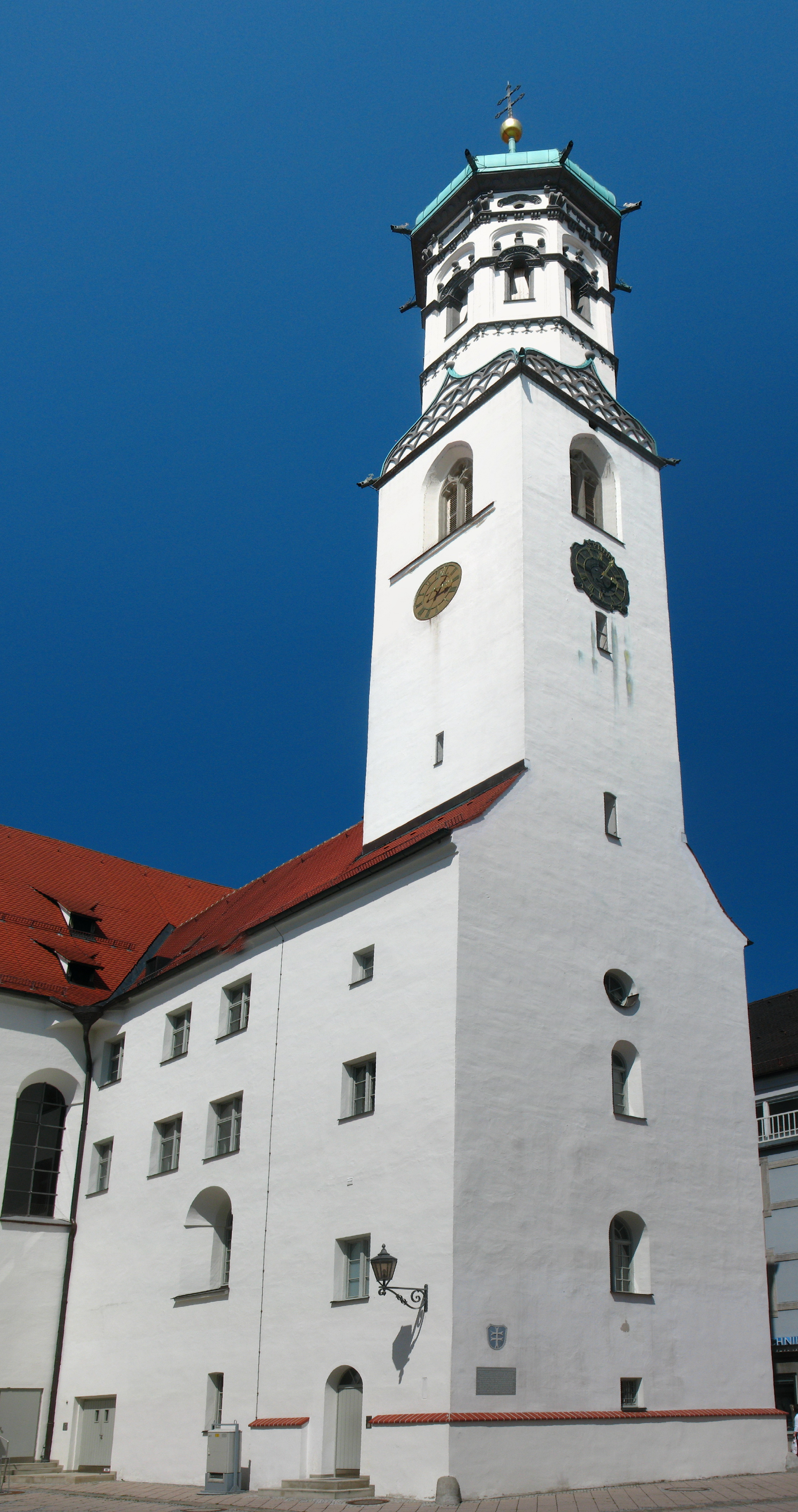 Deutschland, Bayern, Schwaben, Memmingen, Kreuzherrenkoster, Hochpanoramabild